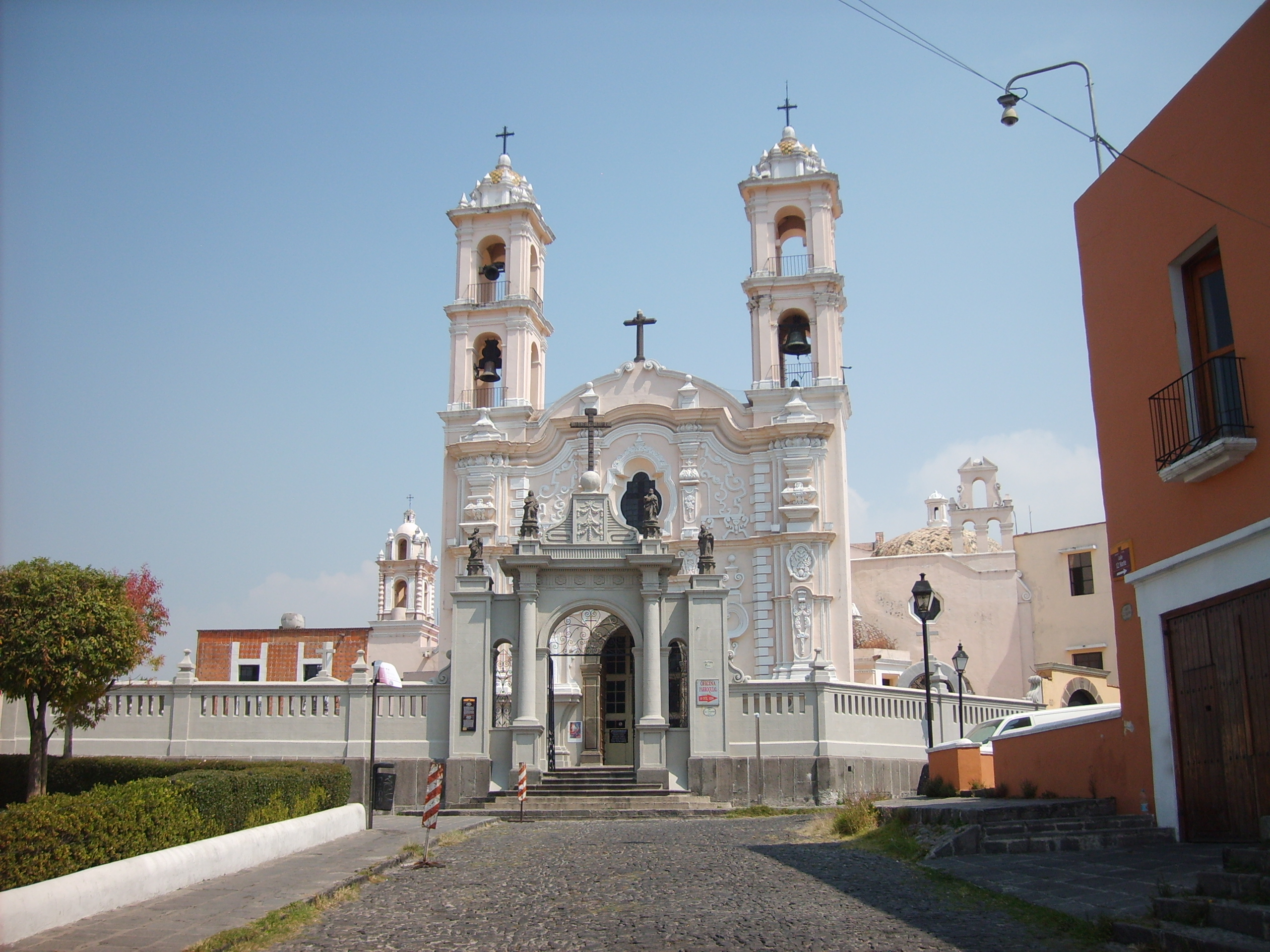 Templo de la Santa Cruz en el barrio del Alto, Puebla, México